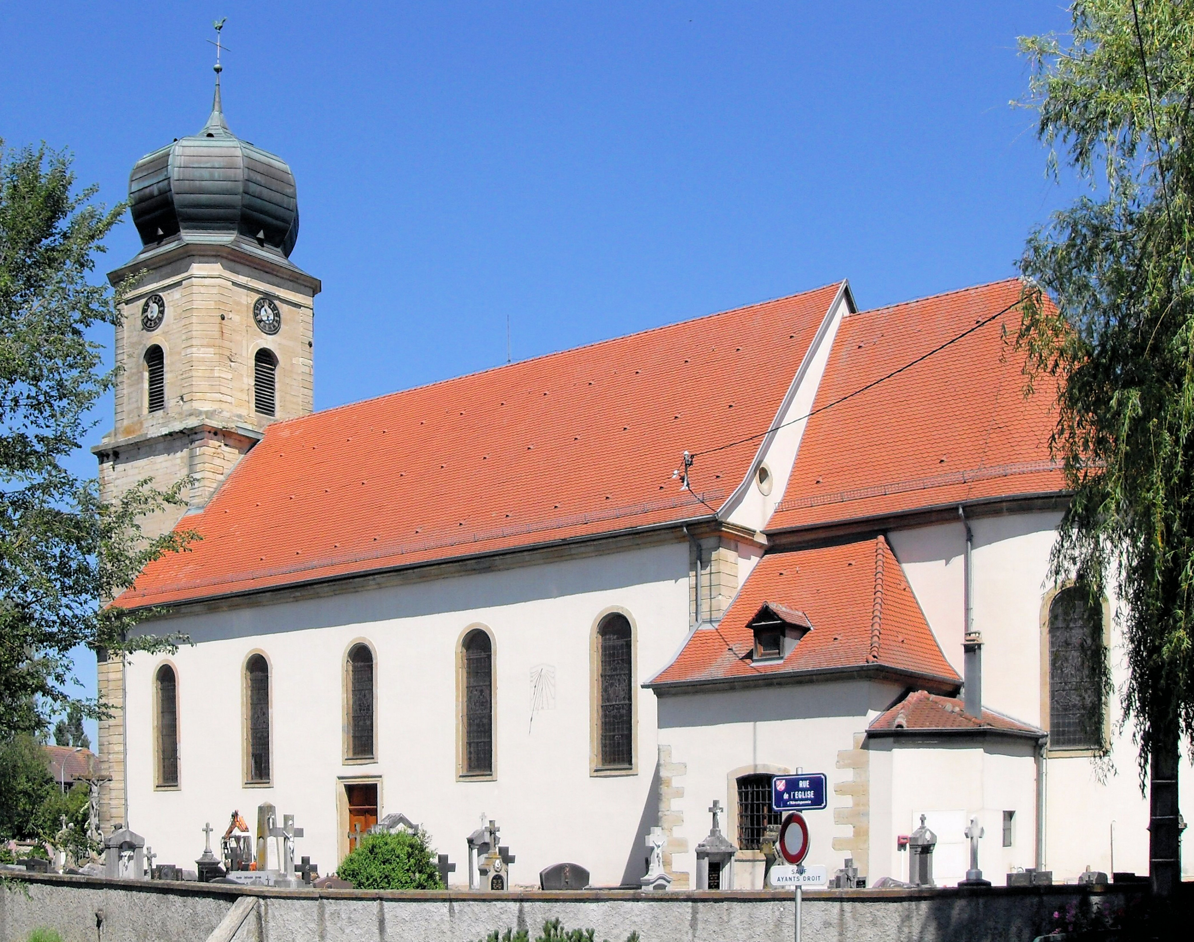 L'église Saint-Jean à Bernwiller